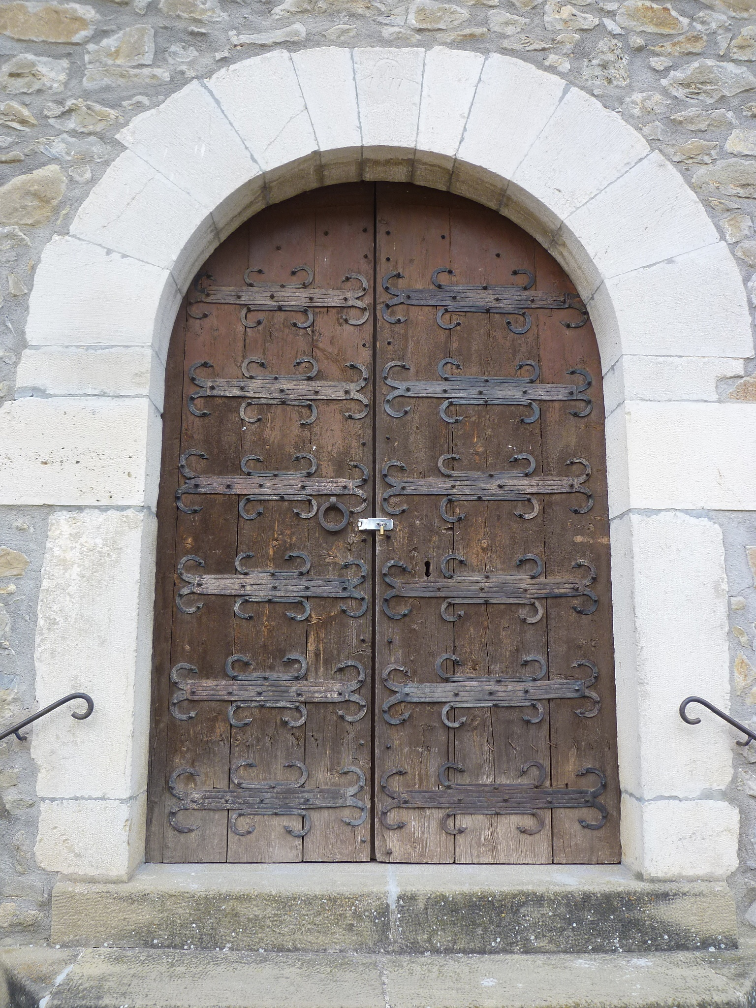 Porta de ferramenta, romànica, de l'esglèsia parroquial de Sant Quirze i Santa Julita del nucli de La Coma.